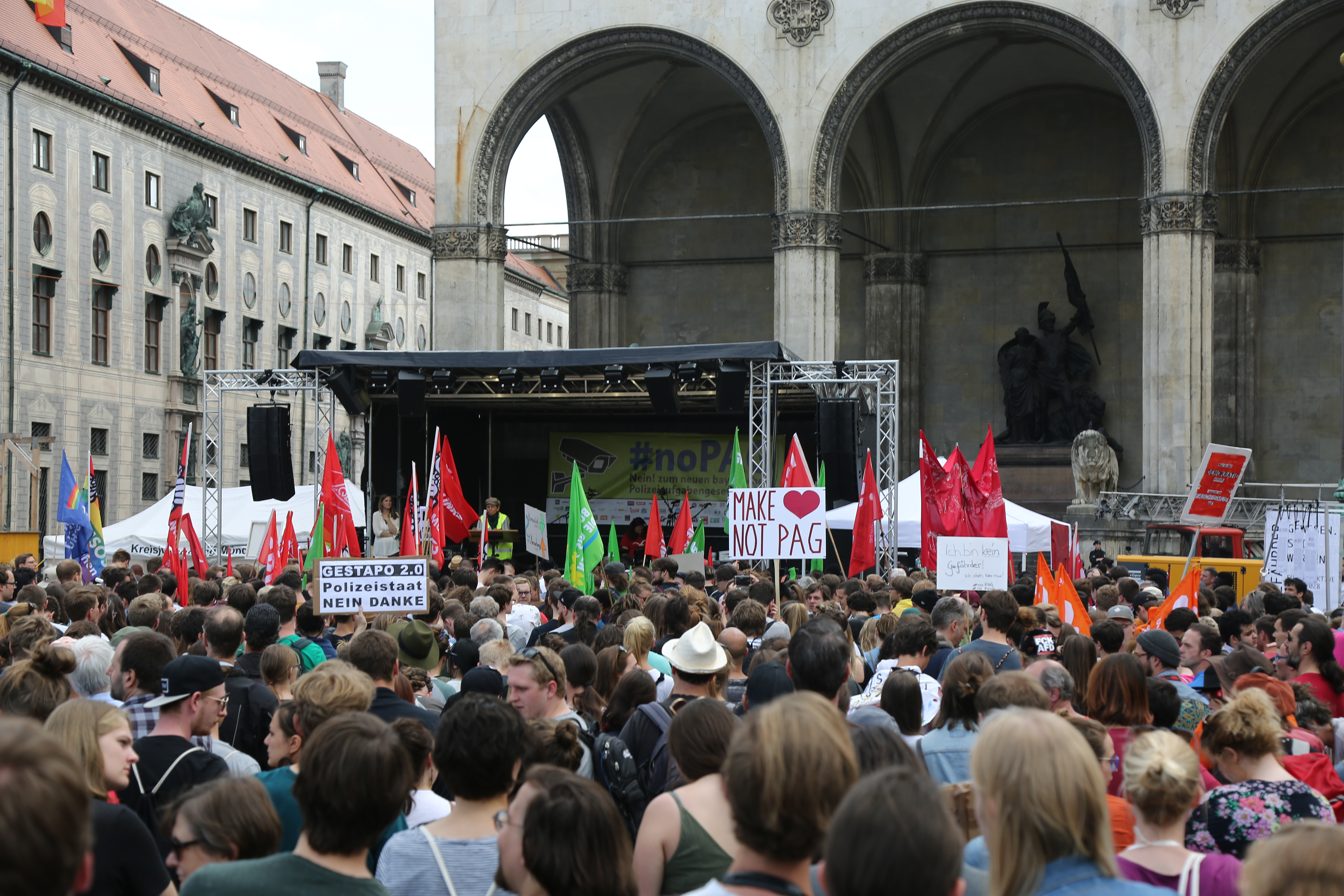 NoPAG-Demo am 2018-05-10 in München gegen das neue bayerische Polizeiaugfgasbengesetz